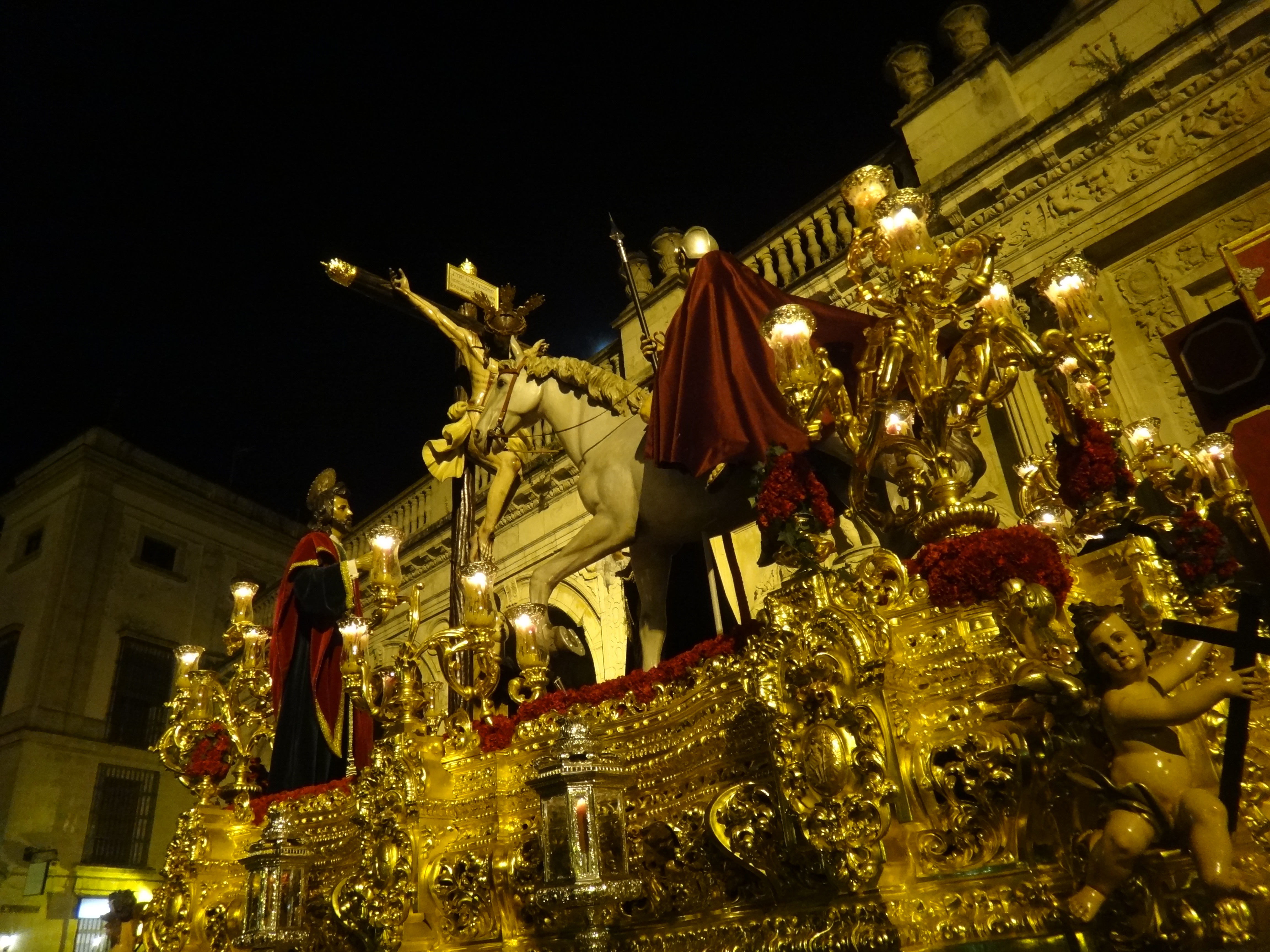 La Lanzada. Semana Santa de Jerez de la Frontera 2015 (Andalucía, España)